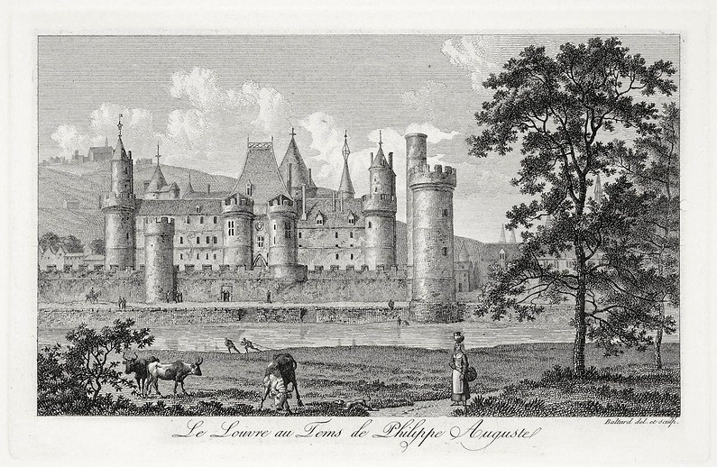 Louvre 1190-1202. La tour du coin est la tour sur la droite.